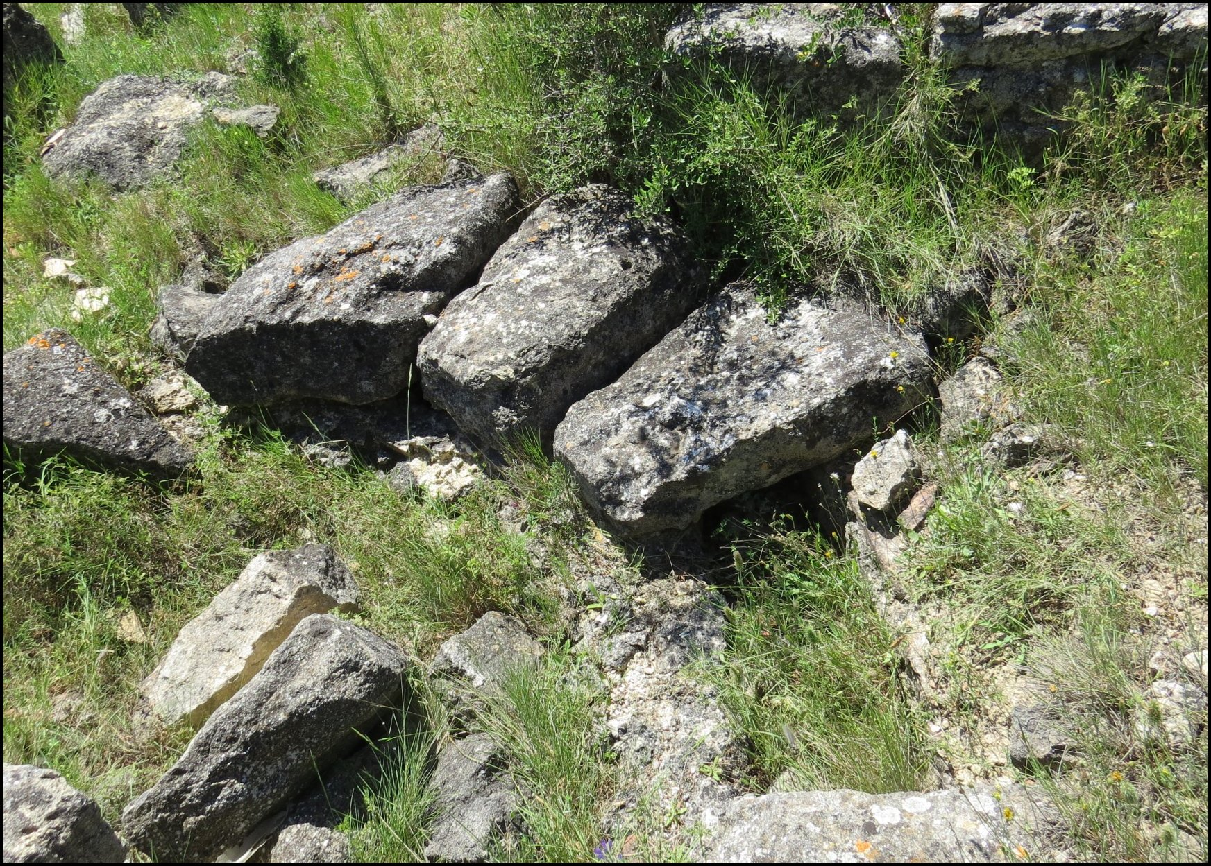 Canalisation incurvée, à grosses dalles de couverture, unissant la piscine B ou "chaude" au grand égout nord-oriental. Villa gallo-romaine de Vivios, Lespignan, Occitanie